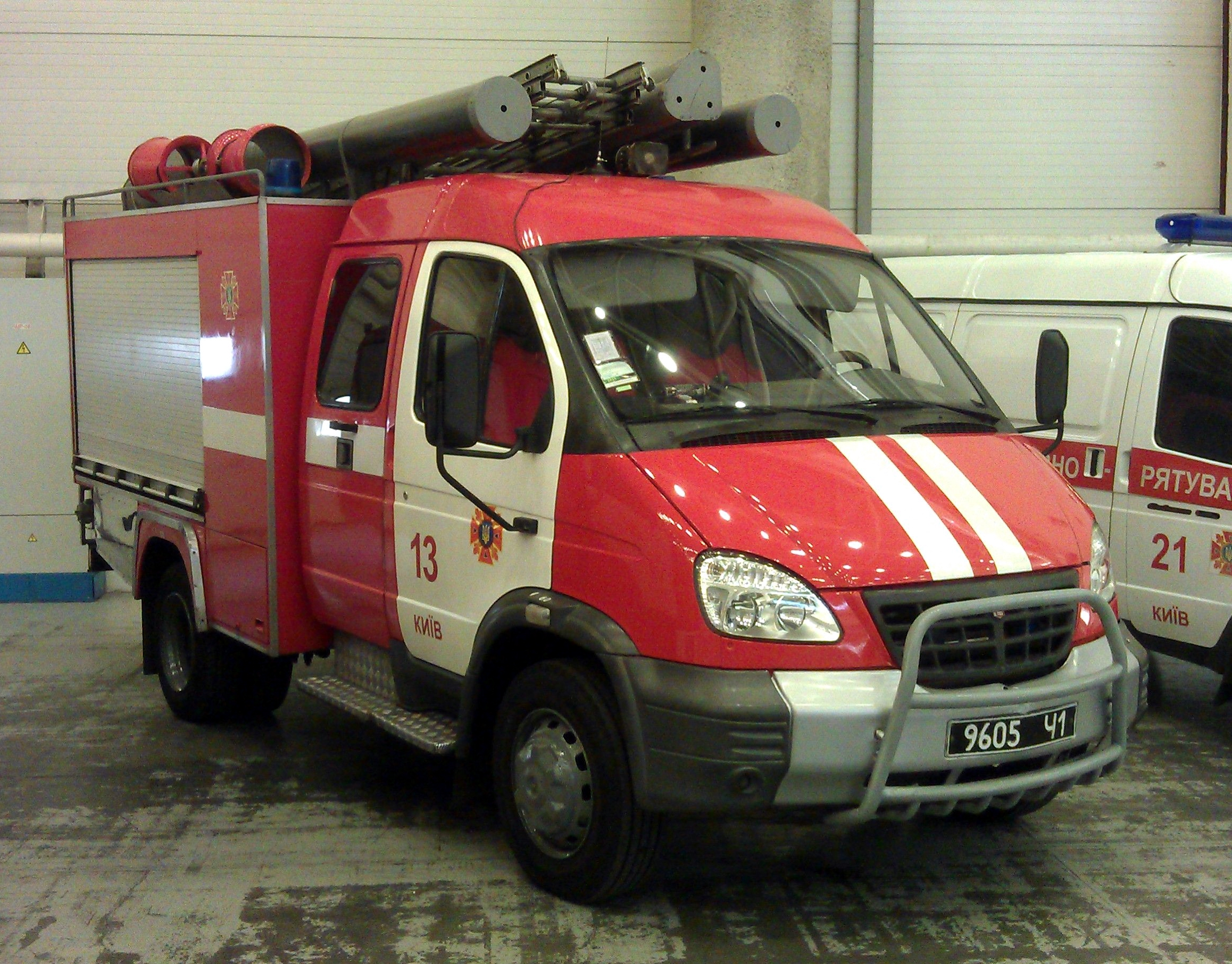 Пожарная автоцистерна АЦ 2,0-40 (30) «Касатка» на шасси ГАЗ-3310 «Валдай» (4х2) в экспозиции Государственной службы Украины по чрезвычайным ситуациям. Выставка "Зброя та безпека", Киев, сентябрь 2015 г.